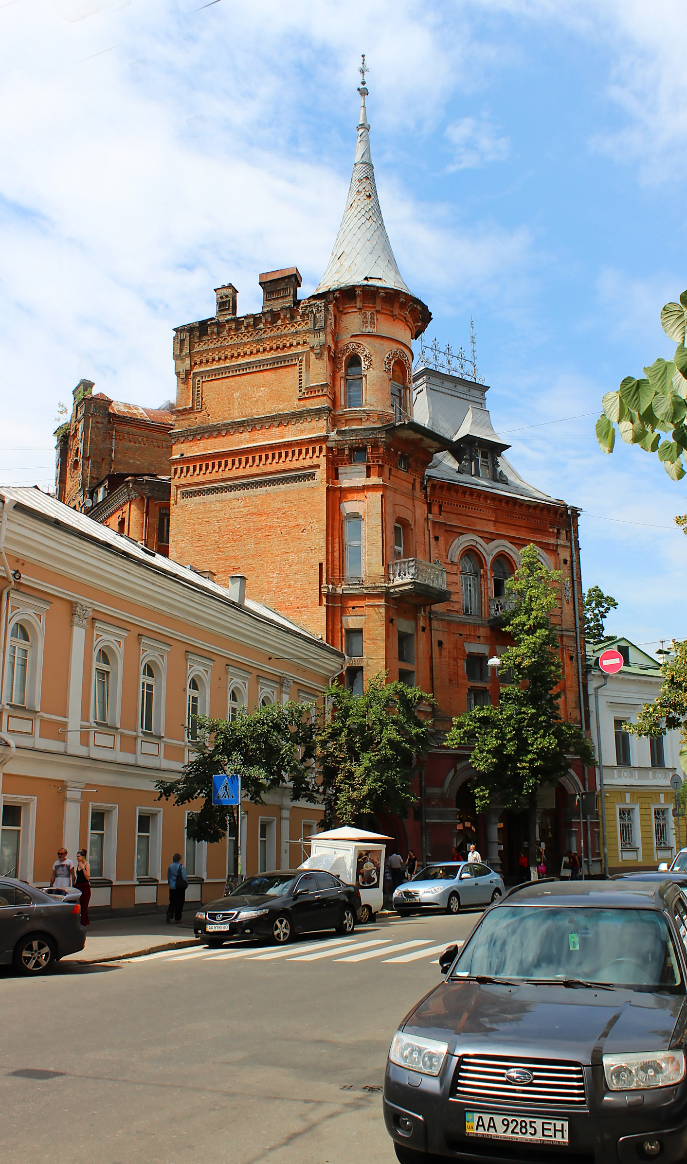 Будинок прибутковий 1896–1898